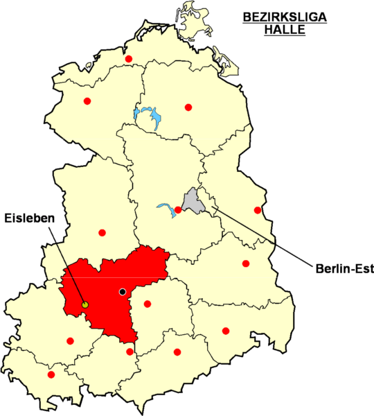 Localisation d'Eisleben dans la "Bezirksliga Halle" à l'époque de la RDA Catégorie:Logo de clubs de football - Allemagne